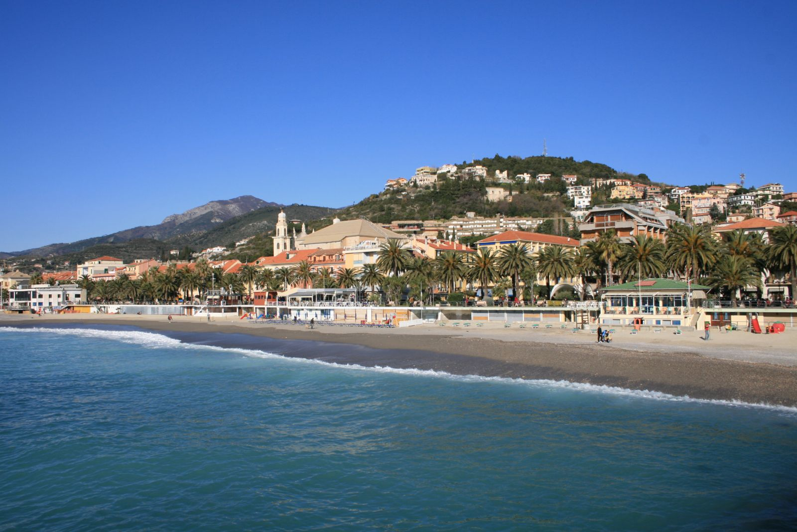 Pietra Ligure Seafront